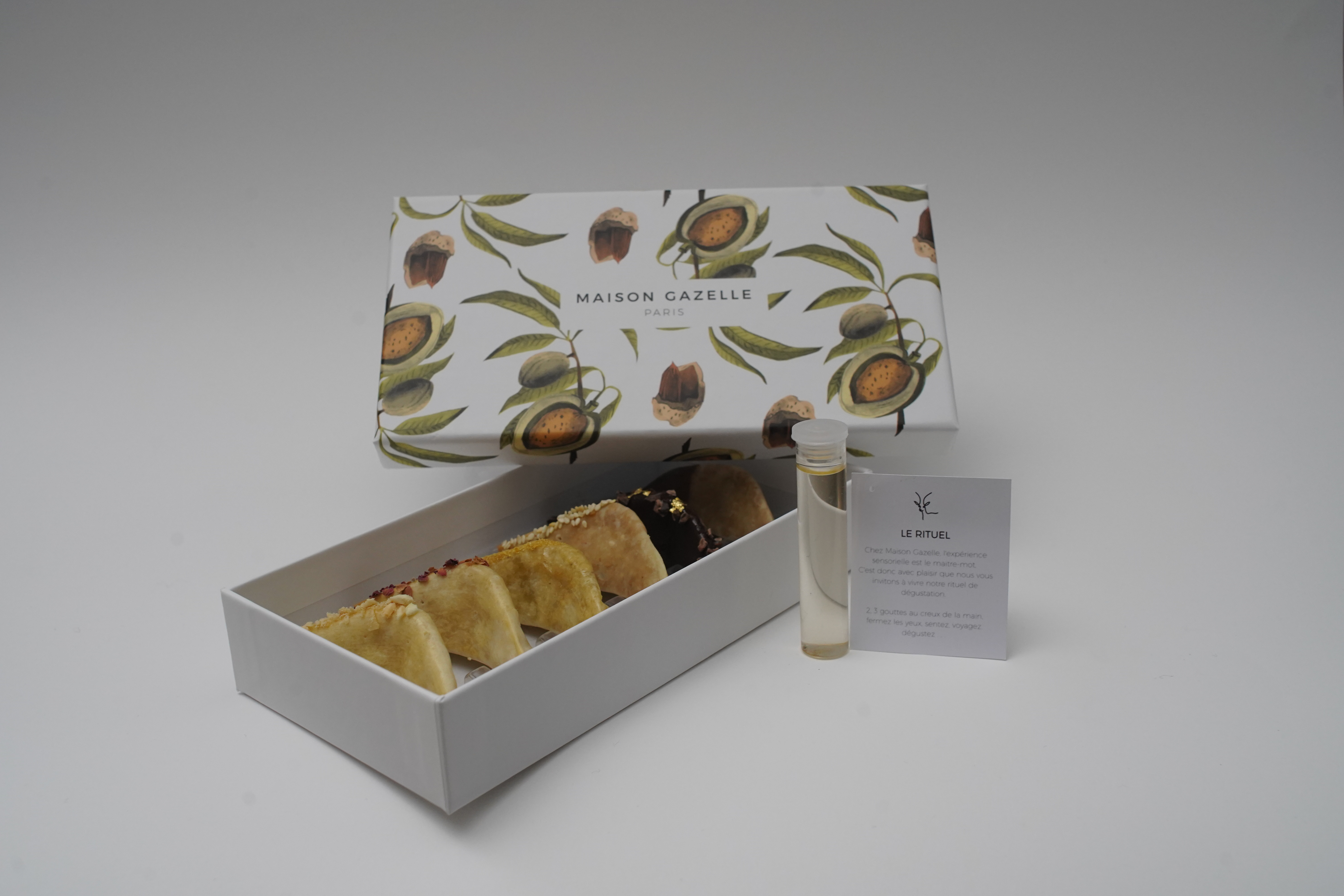 6 saveurs